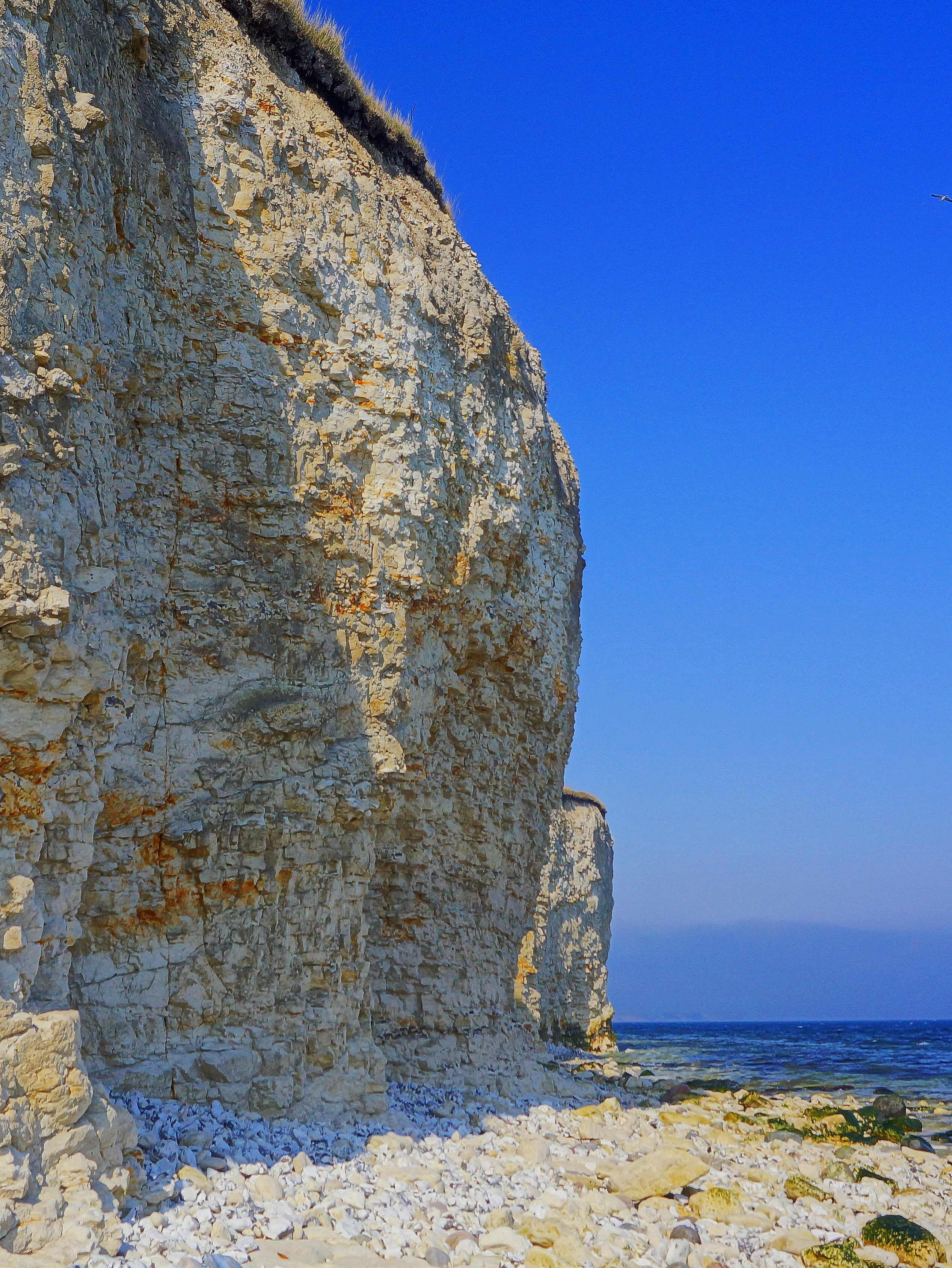 Sangstrup Klint set fra syd mod nord